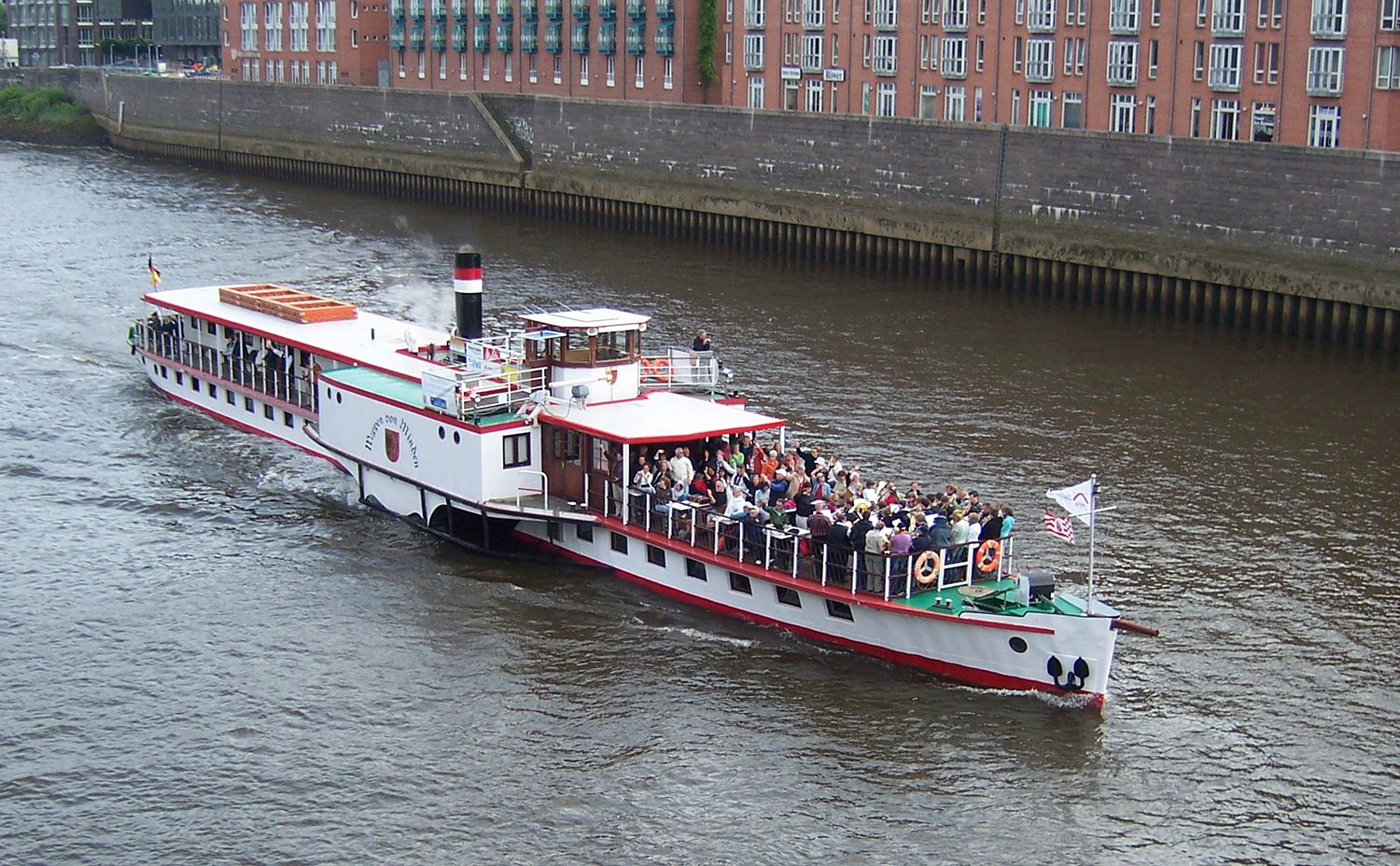 Ev. Kirchentag 2009 in Bremen: Seitenraddampfer Wappen von Minden vor der Teerhofbrücke an der Schlachte